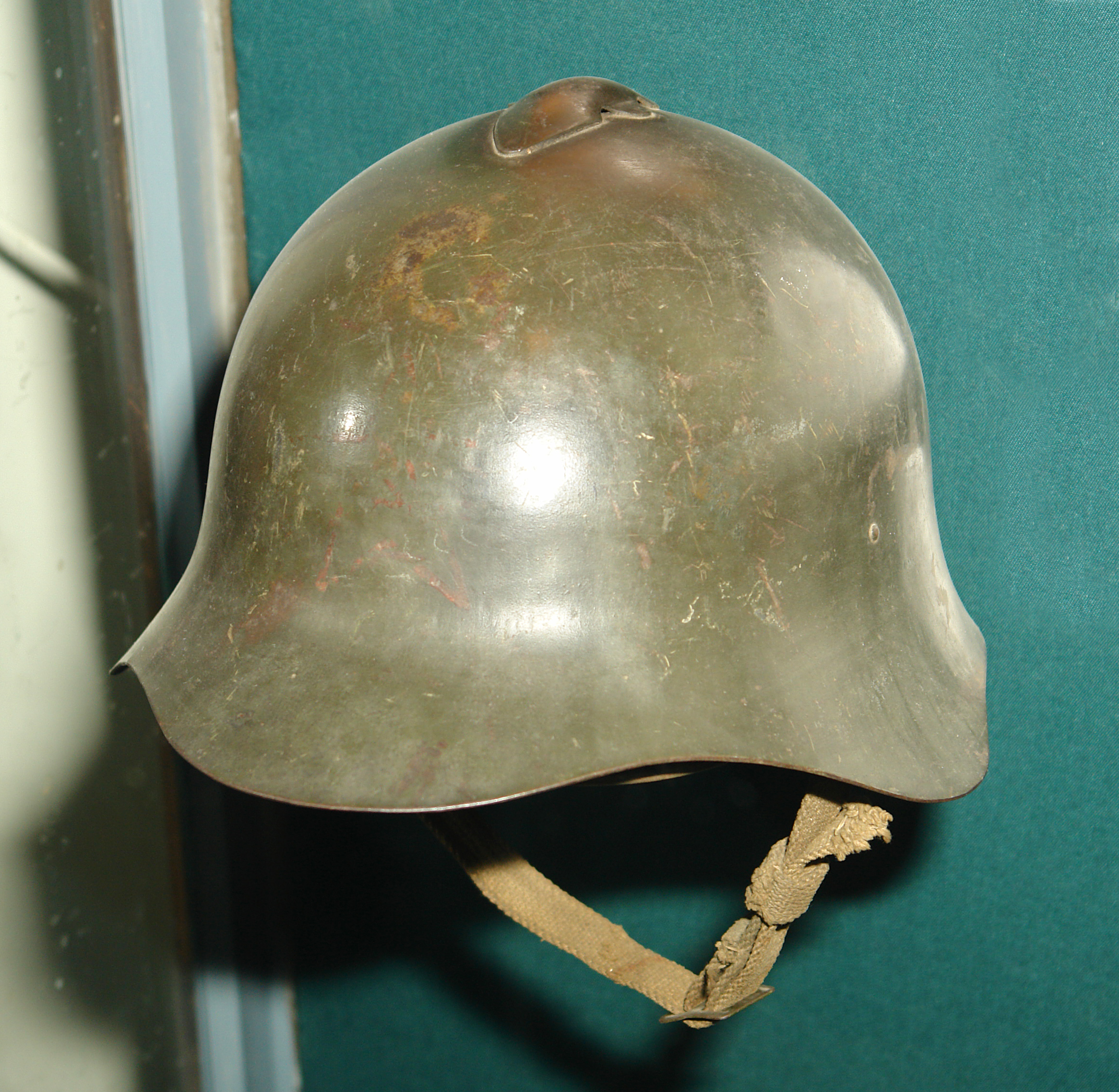 СТАЛЬНОЙ ШЛЕМ (КАСКА) обр. 1936 г. Военно-исторический музей артиллерии, инженерных войск и войск связи, Санкт-Петербург.